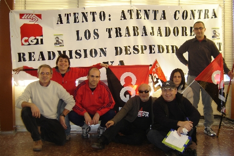 atento cgt